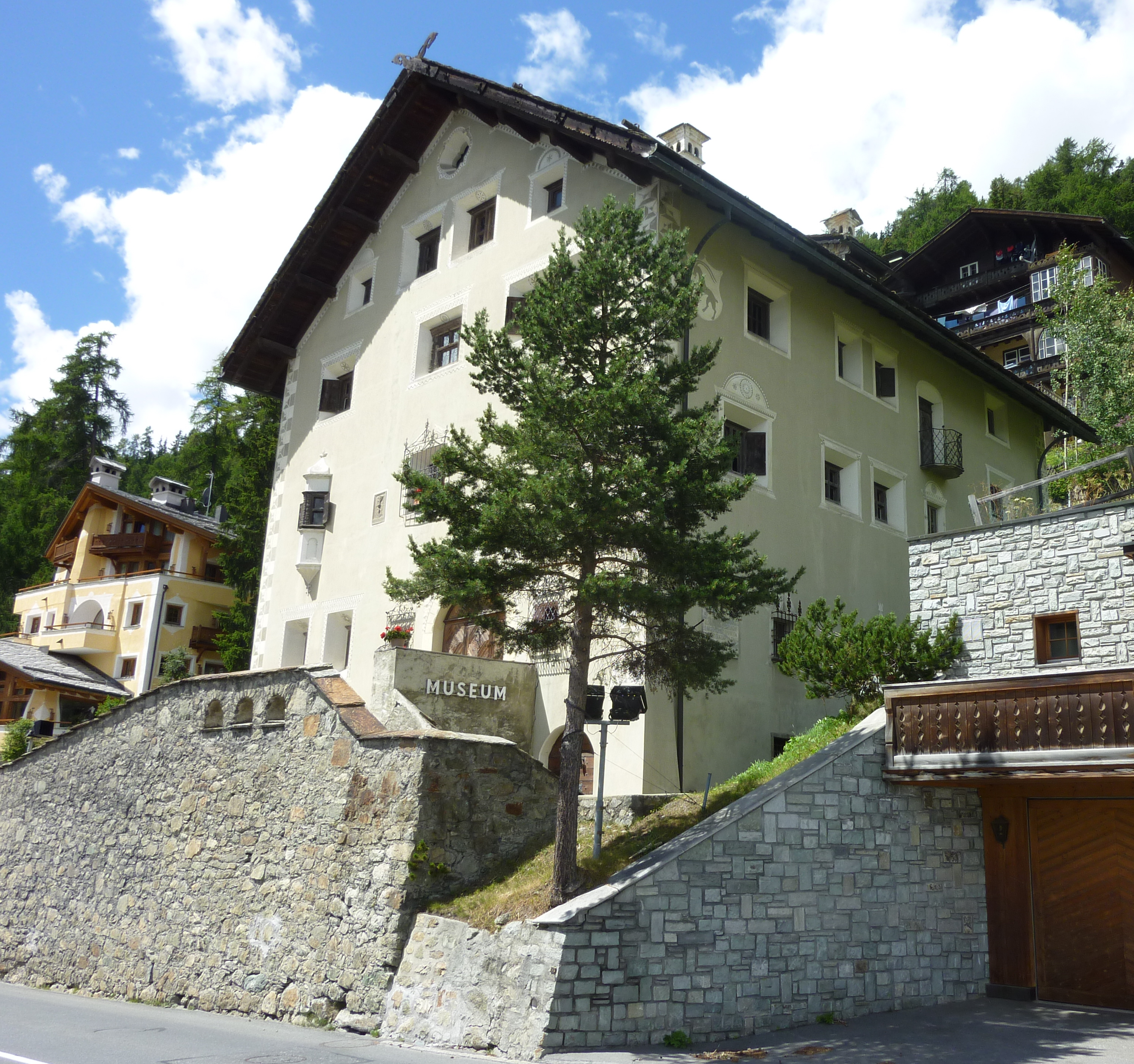 Engadin Museum in St. Moritz